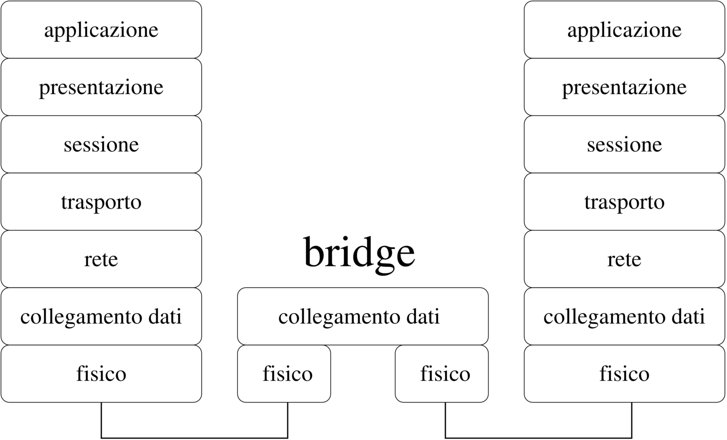 Figura 32.10. Il bridge trasferisce PDU di secondo livello; in pratica trasferisce tutti i tipi di pacchetto riferiti al tipo di rete fisica a cui è connesso.